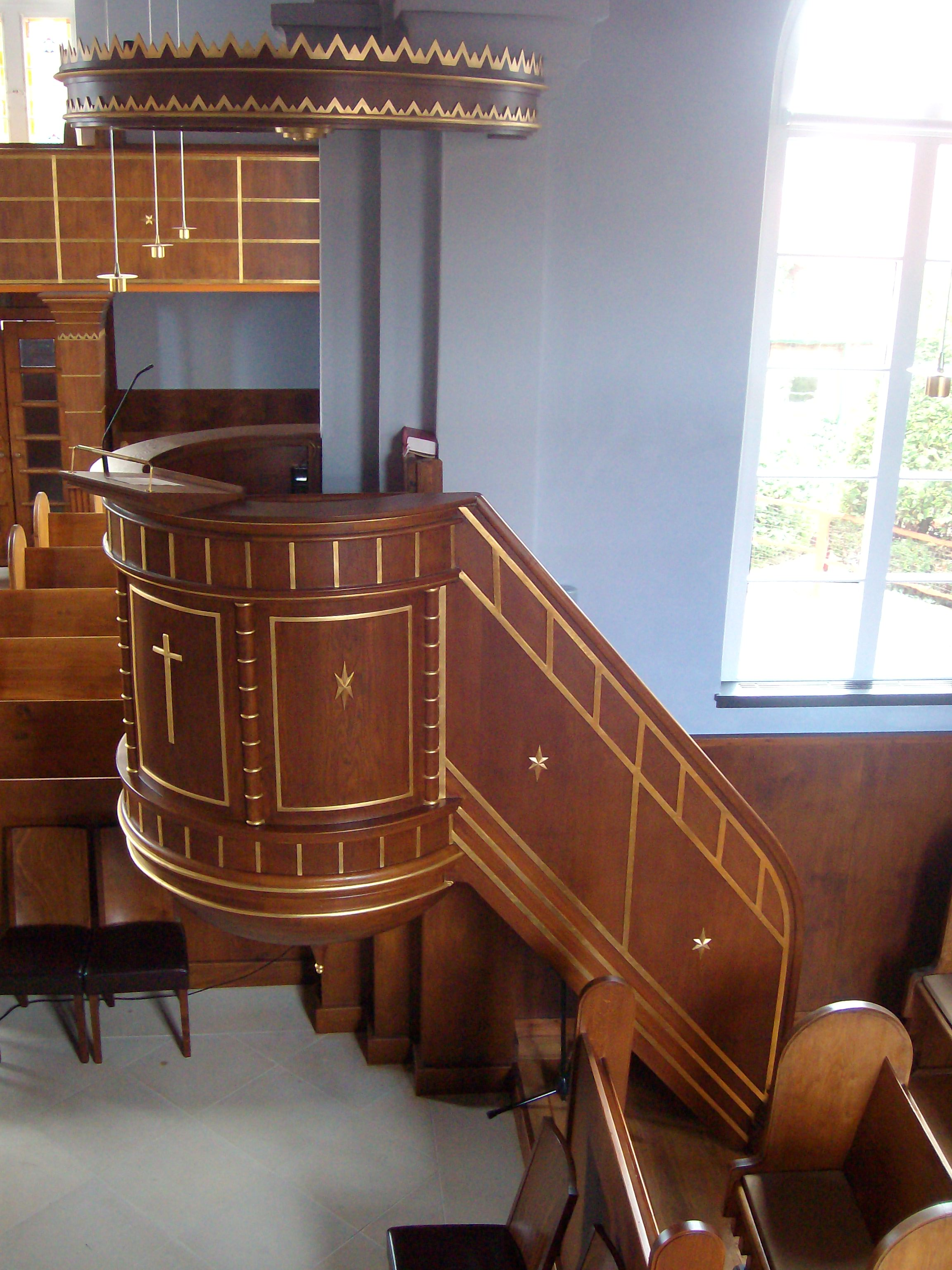 Kanzel der Kirche in Jemgum, Ostfriesland